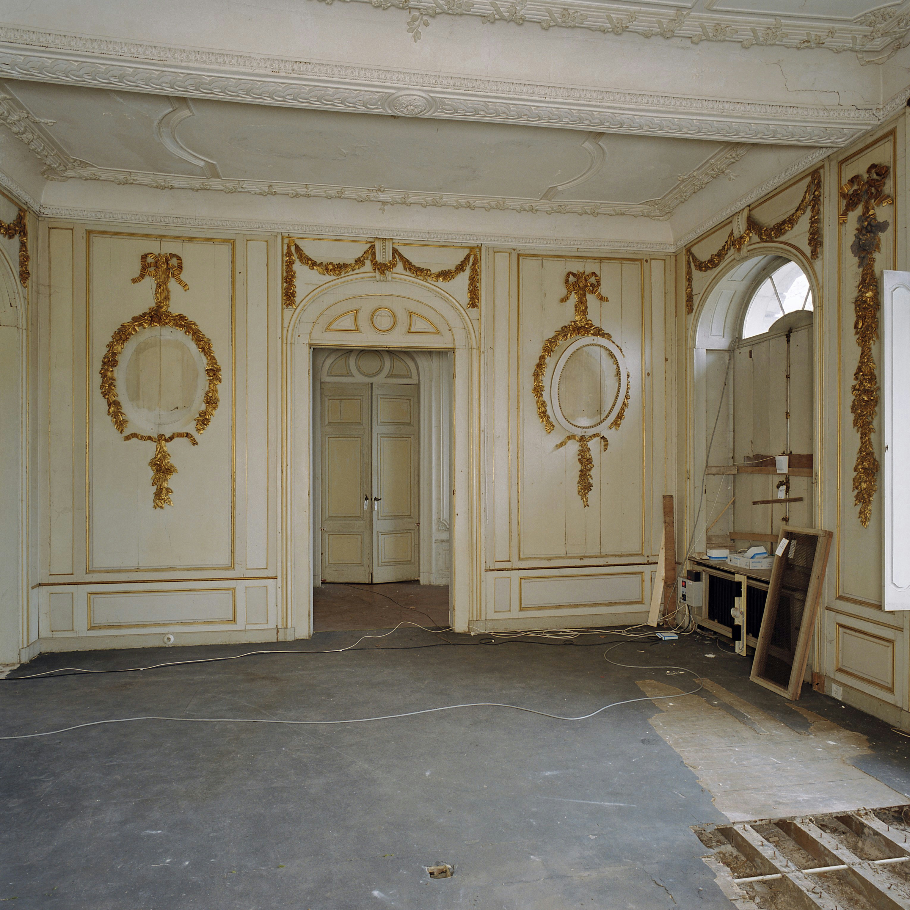 Kasteel Neubourg: Interieur, linker voorkamer (Gouden Zaal), detail deurstuk